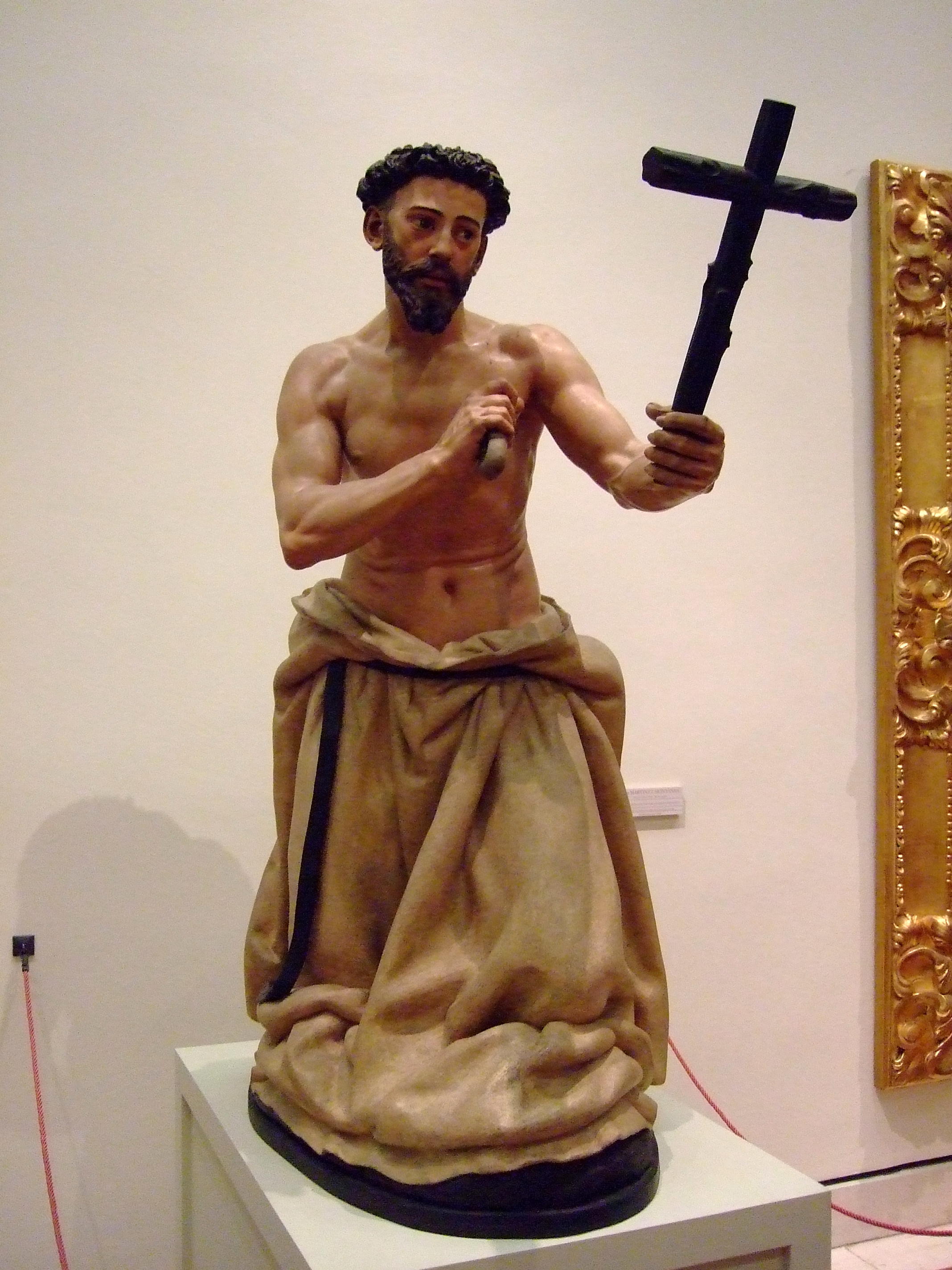 Escultura de Santo Domingo de Guzmán penitente - Autor: Martínez Montañés - Año: 1607 - Museo de Bellas Artes de Sevilla